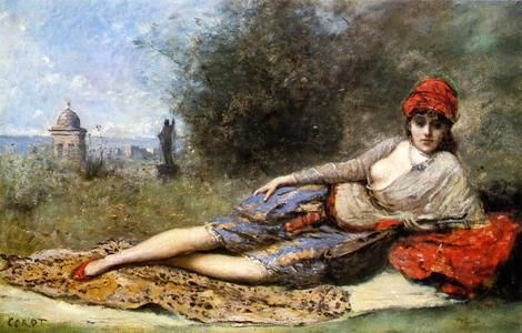 L'odalisque Sicilienne Corot, Hecht Collection